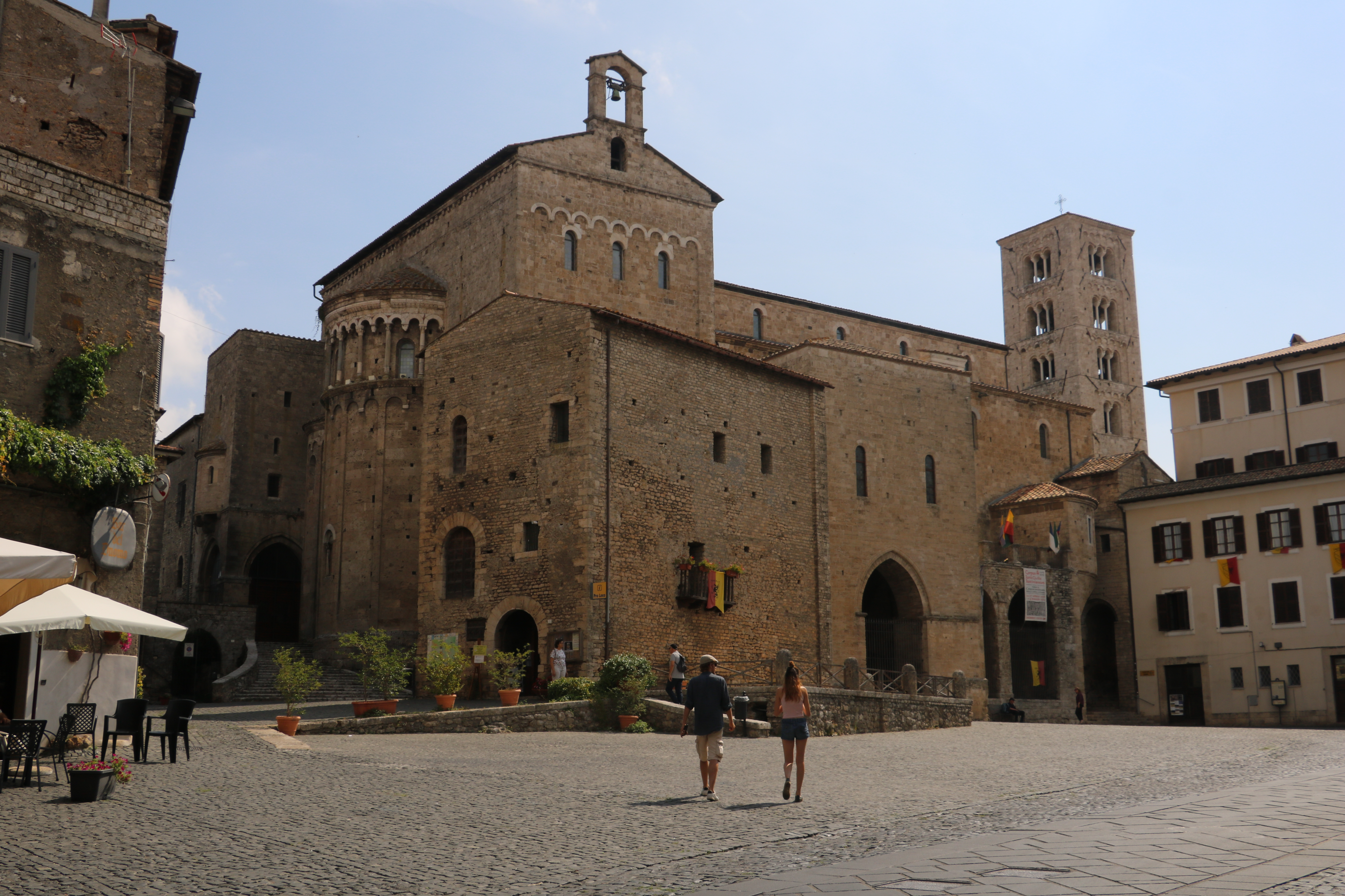 cattedrale di Santa Maria This is a photo of a monument which is part of cultural heritage of Italy.